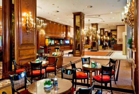 Lobby des InterContinental Wiens